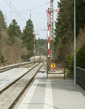 Handbetriebene Ausfahrsignale am Bahnhof Seeshaupt (Richtung Tutzing). In Seeshaupt bedient der Fahrdienstleister die Signale noch per Hebel.